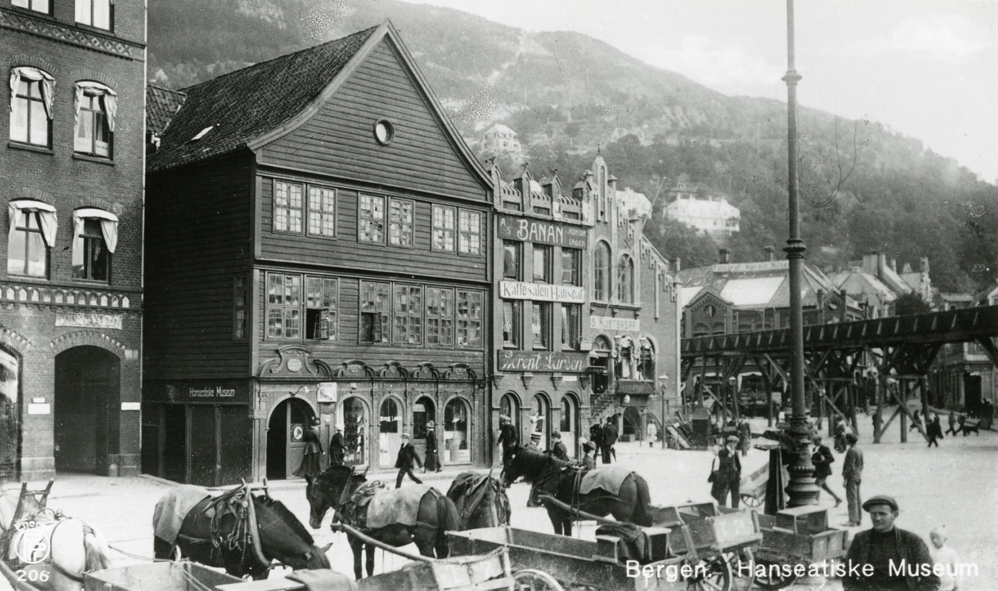 Finnegården - Hanseatisk museum (Bryggen) The viaduct was in use under tunnel construction of Fløibanen and Skoltegrunnskaien.